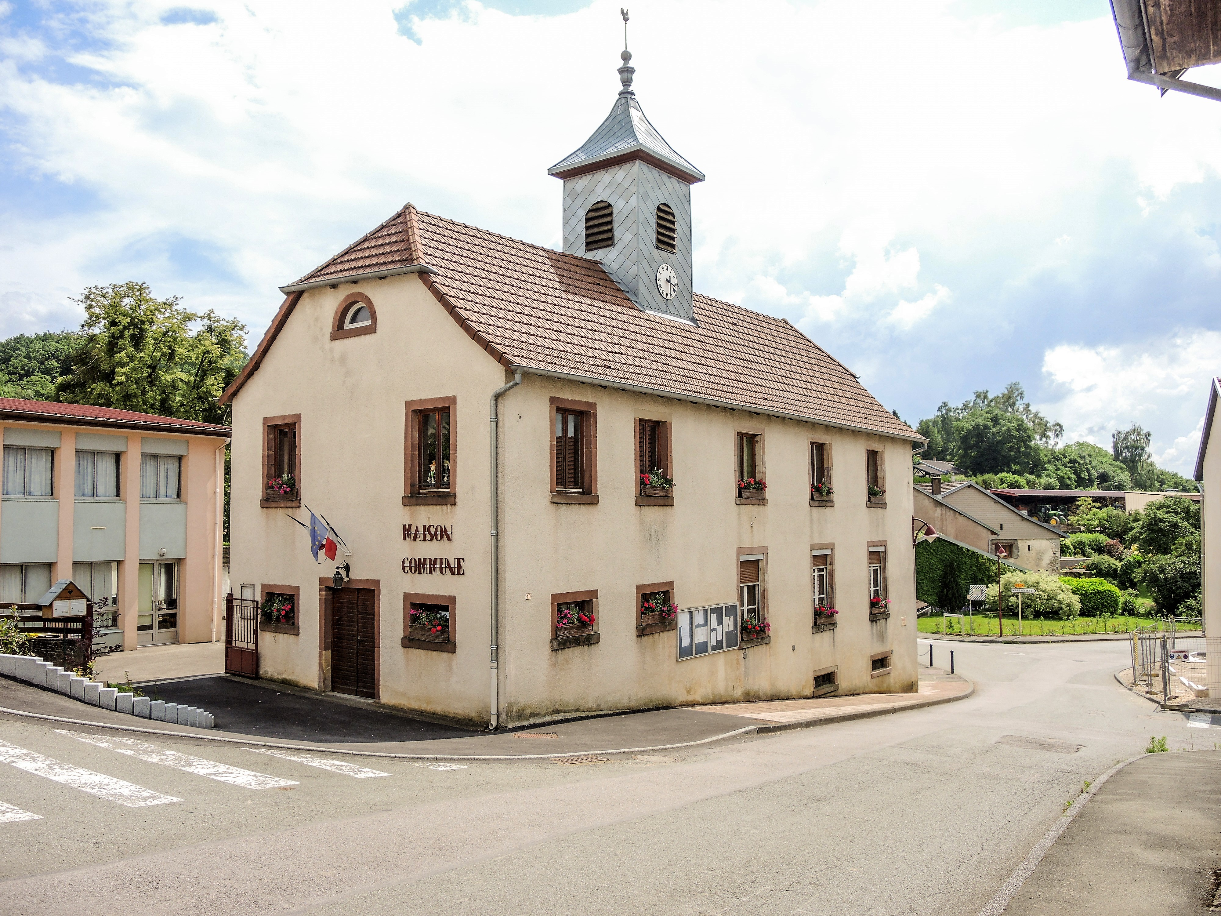 Mairie-école du village de Laire. Doubs